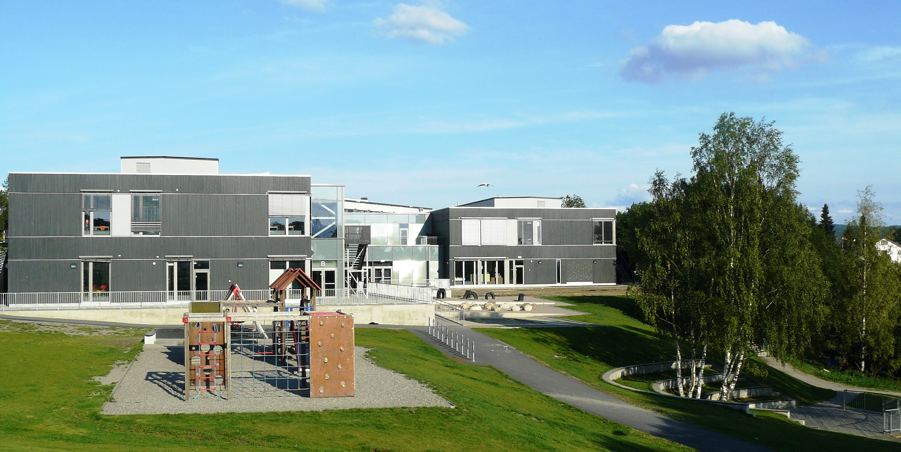 Løren school, Oslo